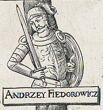 Беларуская (тарашкевіца): Уяўны партрэт князя Андрэя Альгердавіча (Andrej Algierdavič) (?). У подпісе «Андрэй Фёдаравіч», відаць, памылка